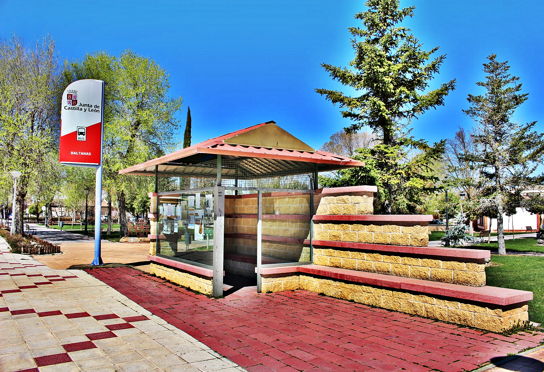 Marquesina de autobuses de Baltanás